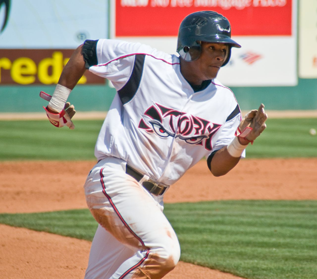 Cedric Hunter